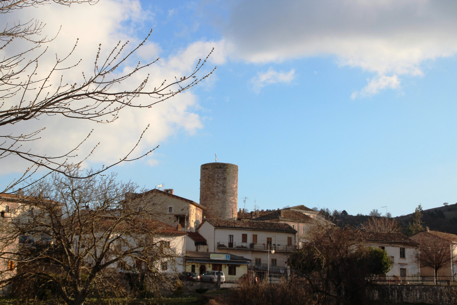 Ovindoli